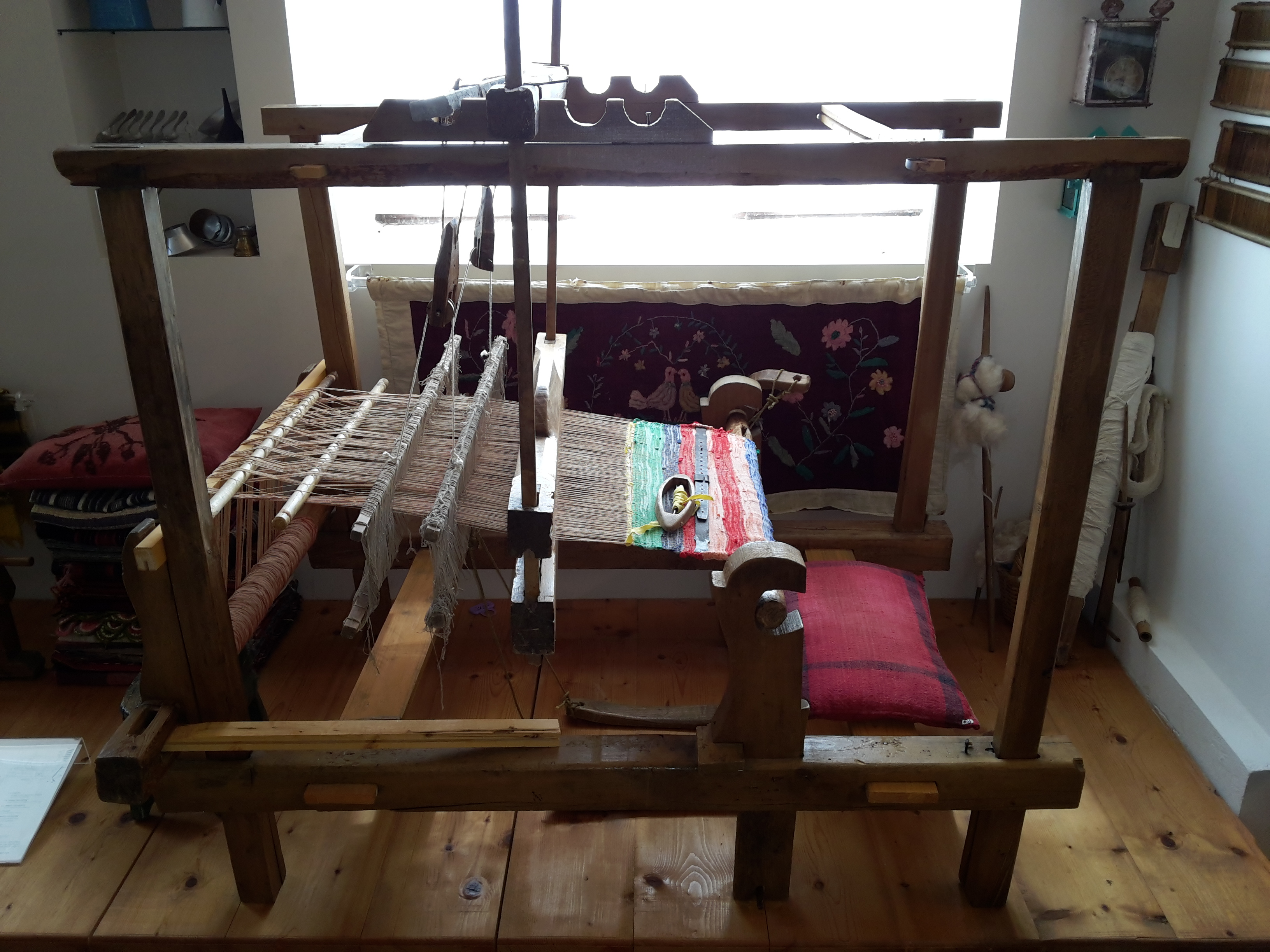 Αργαλειός . Πολιτιστικό κέντρο Καλοσκοπής